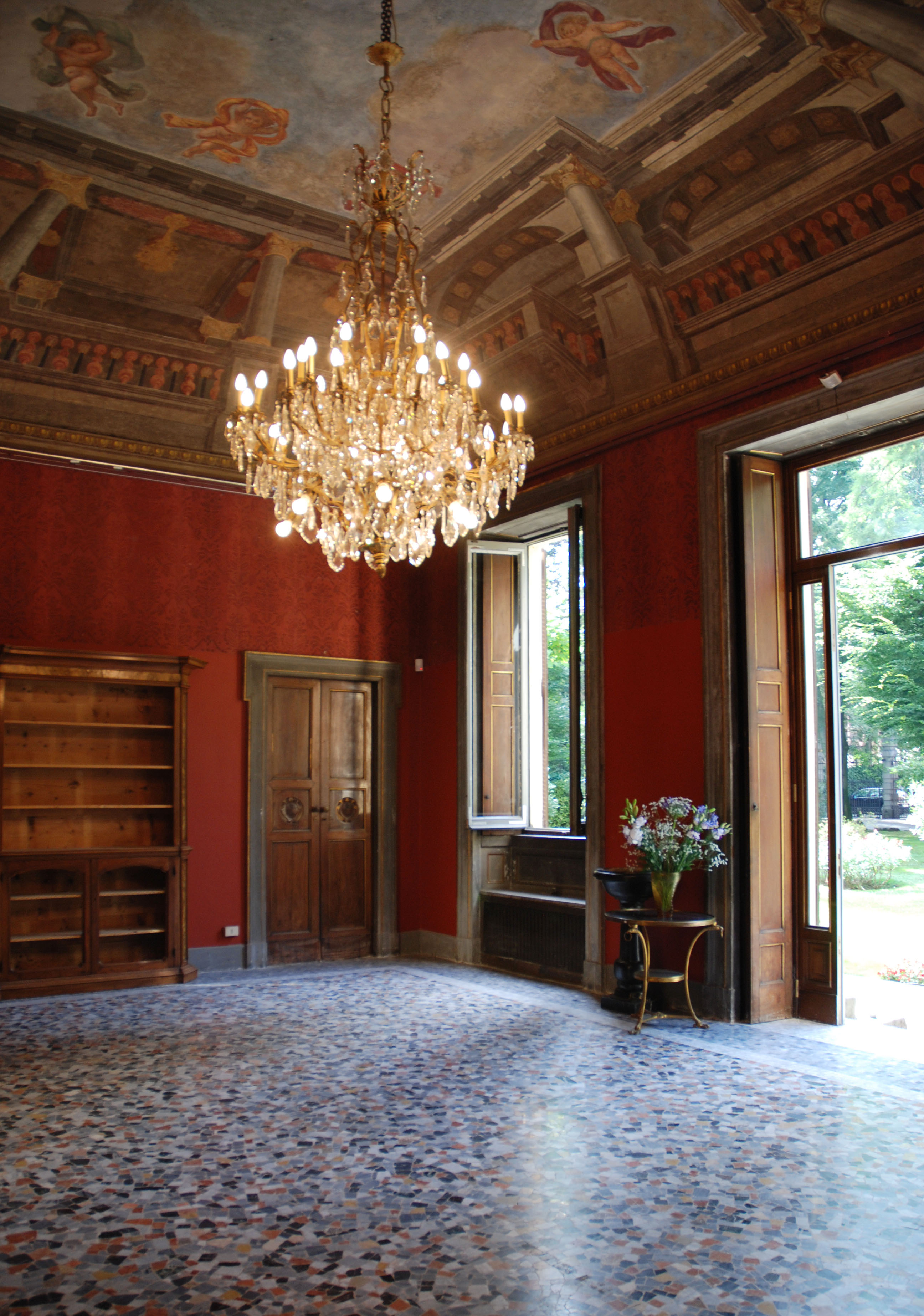 Veduta del salone che si affaccia sul giardino